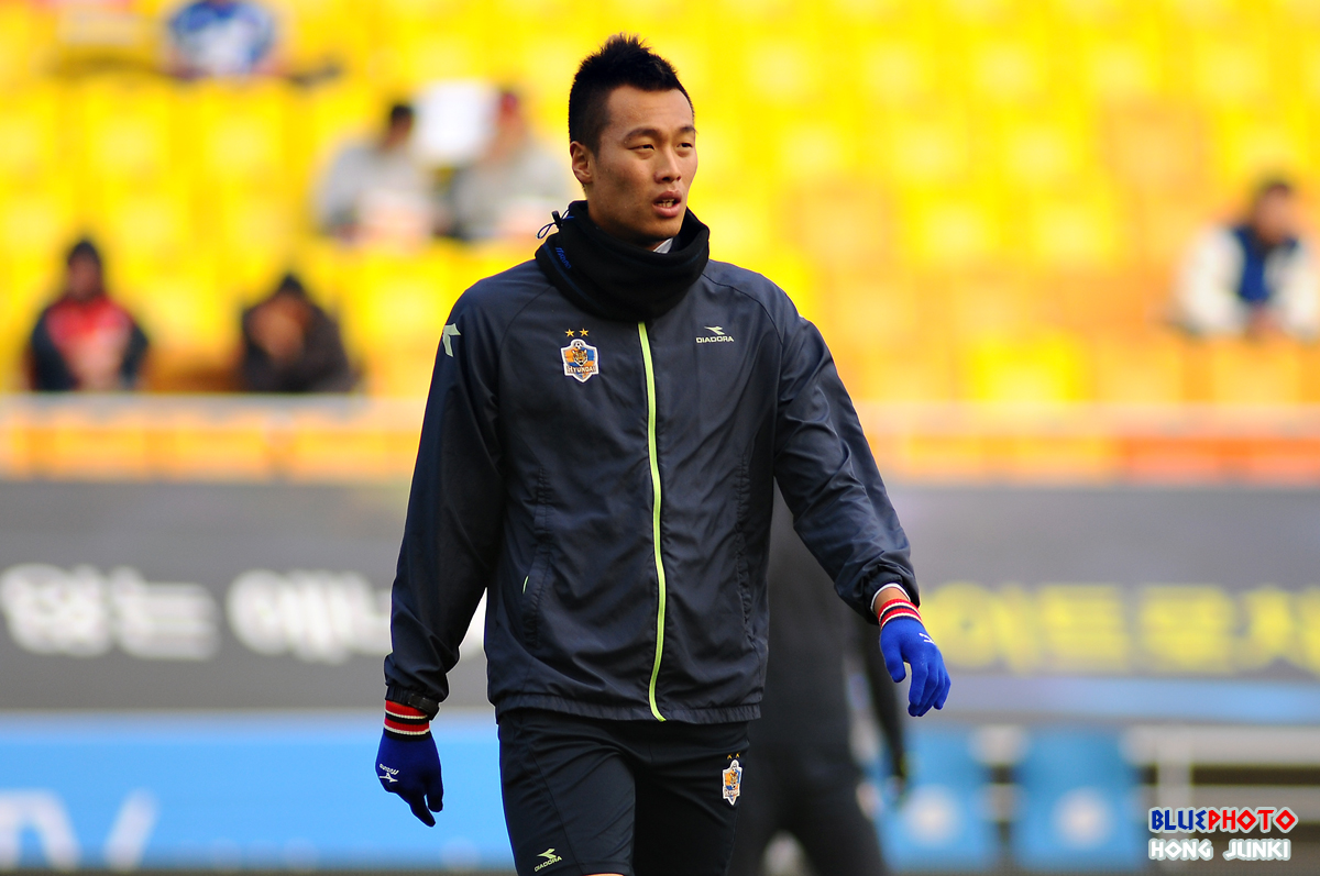 울산 현대 김신욱